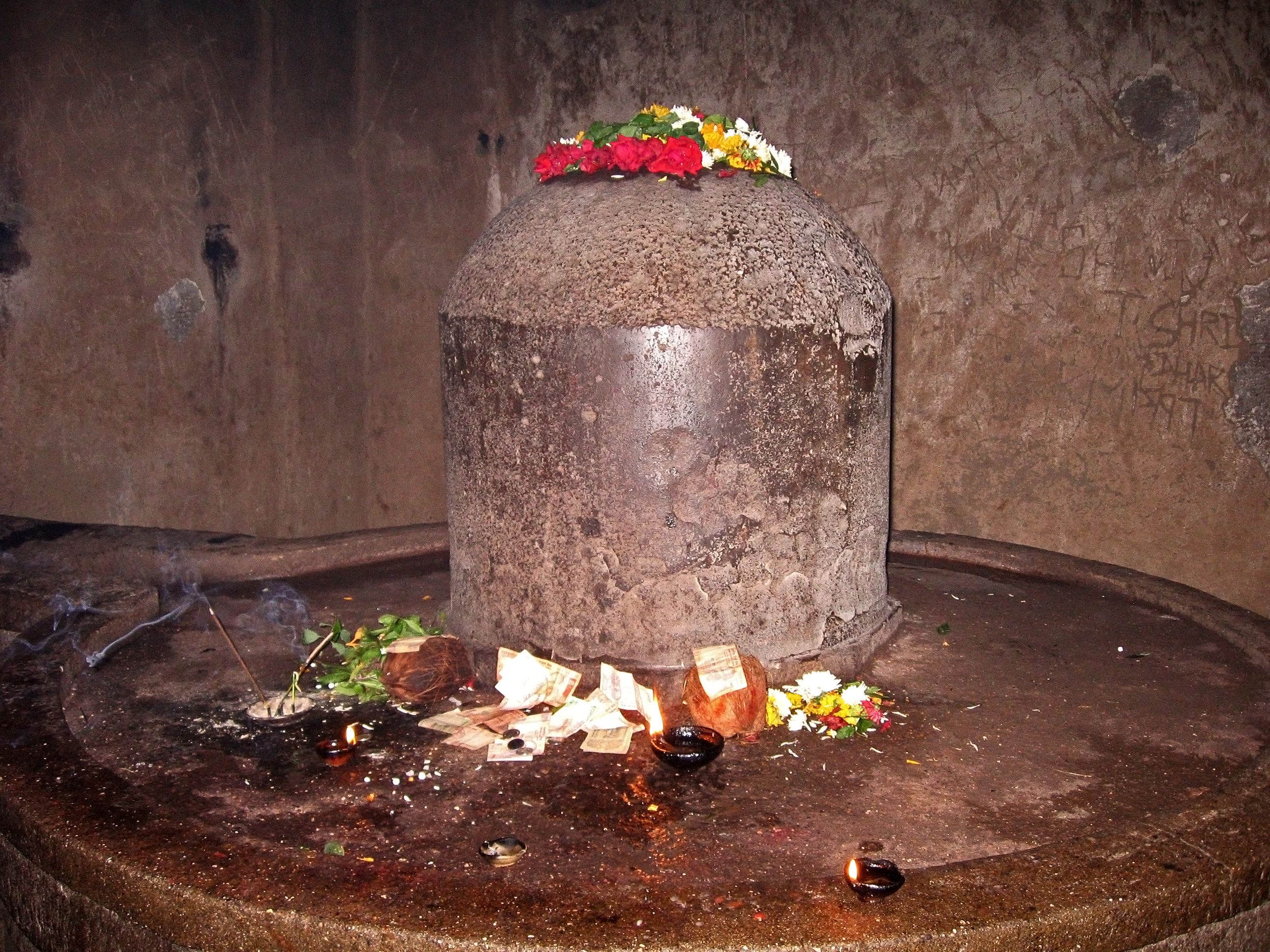 A Shiva linga at Kailas Temple.